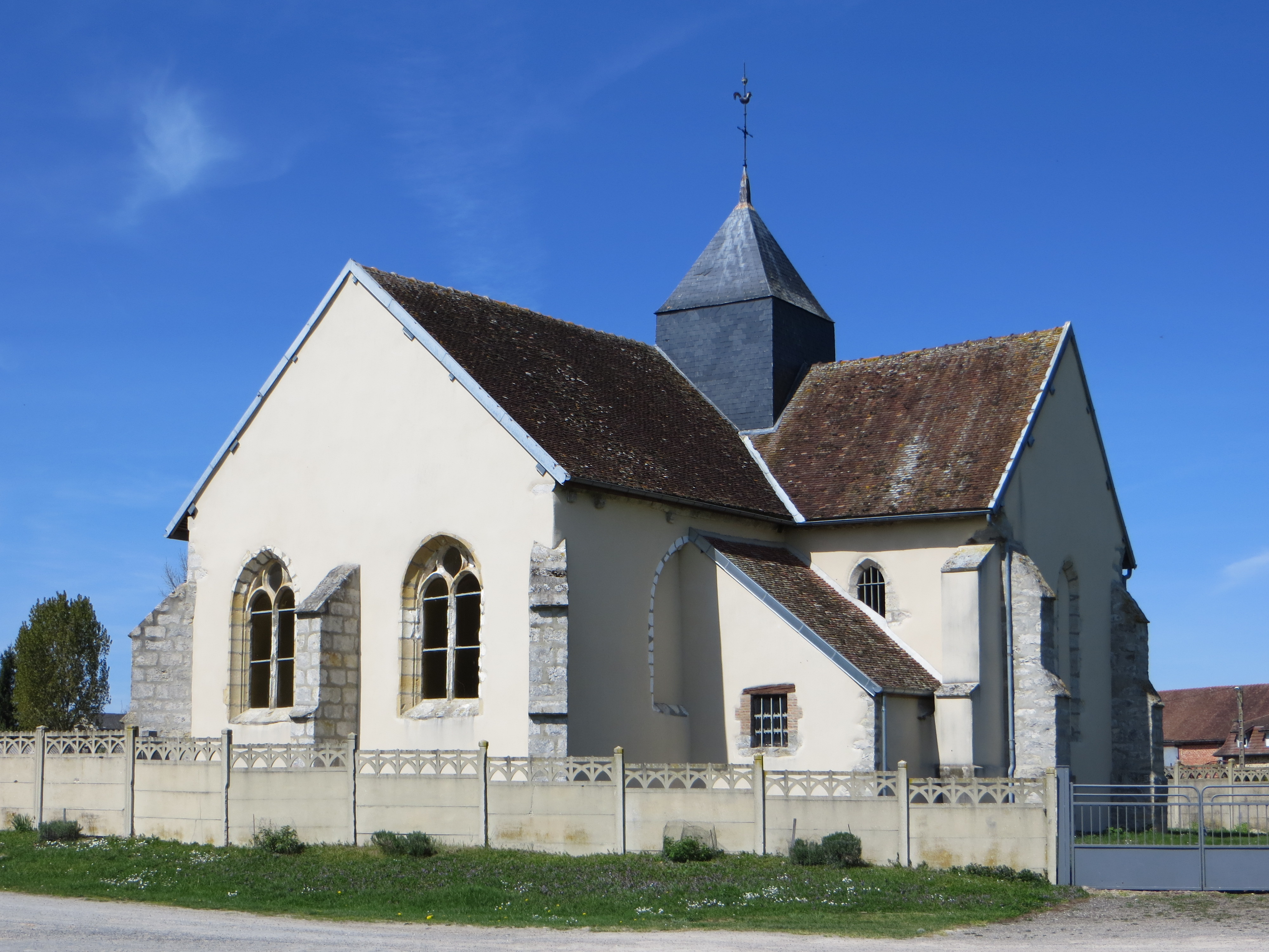 Vue de l'église